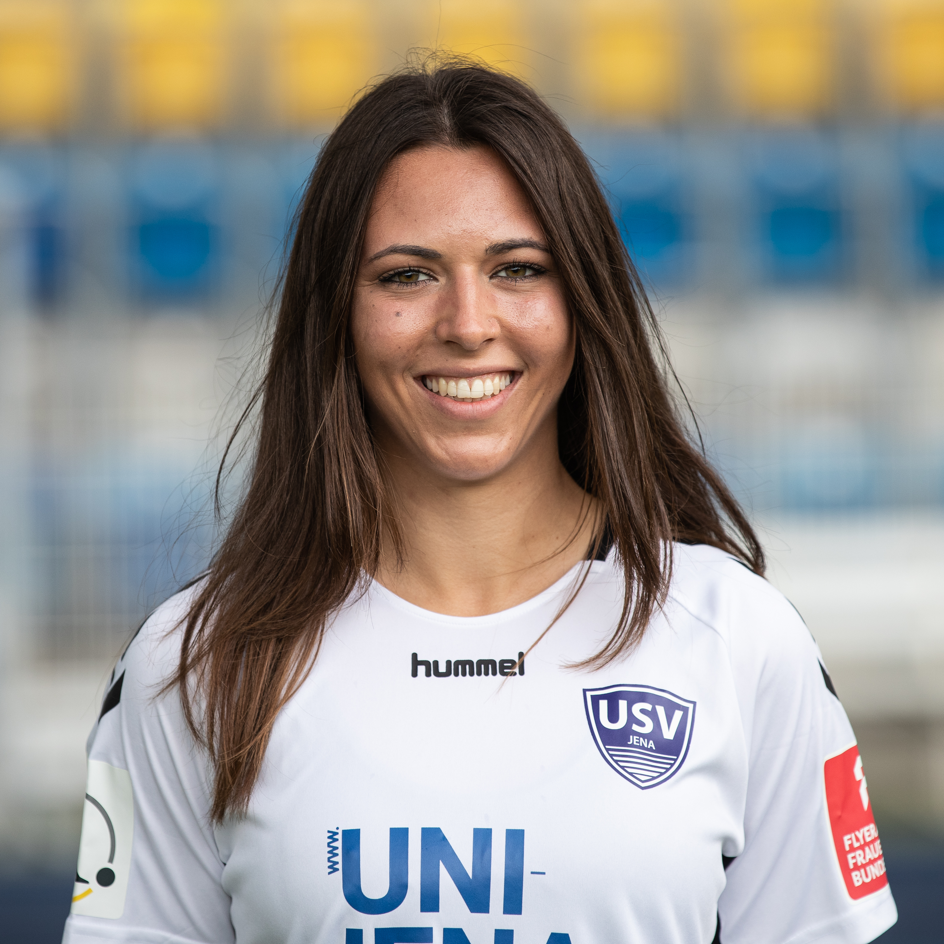 Fußball, Flyeralarm Frauen-Bundesliga, Mannschaftsfotos FF USV Jena; Leonie Kreil (FF USV Jena, 11); Porträt, Einzelbild